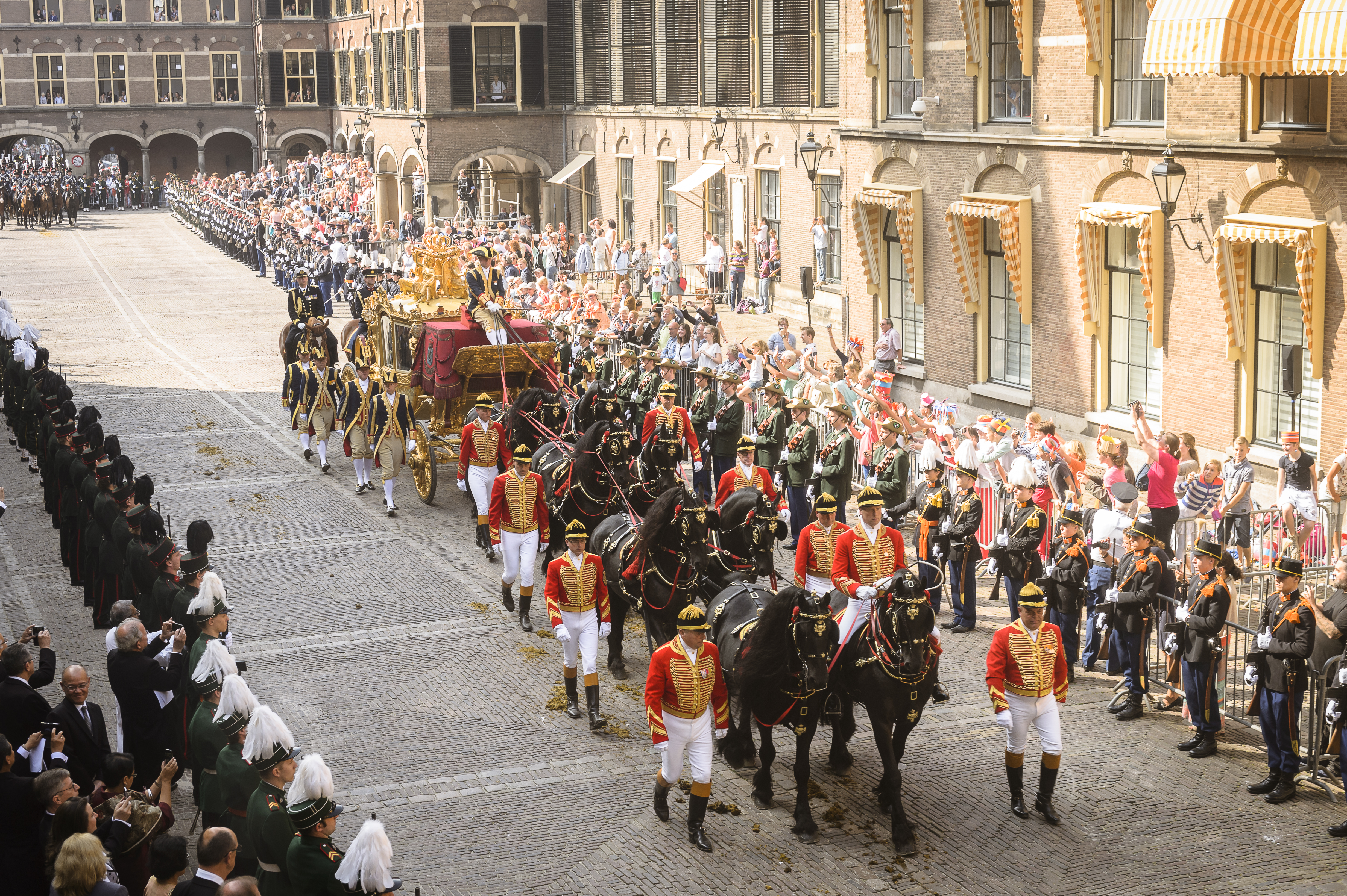 Gouden Koets verlaat het Binnenhof